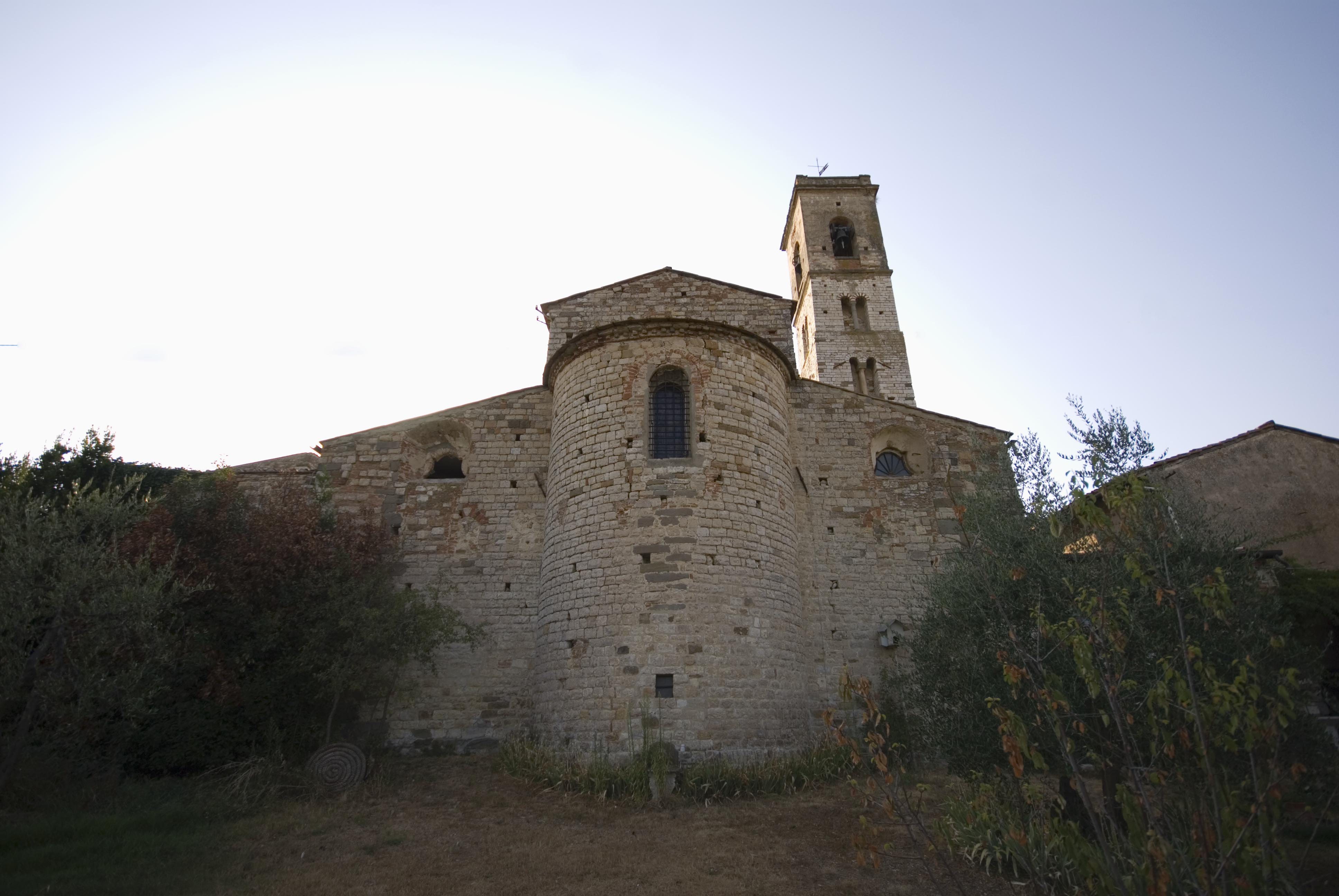 Abside di Sant'Alessandro a Giogoli